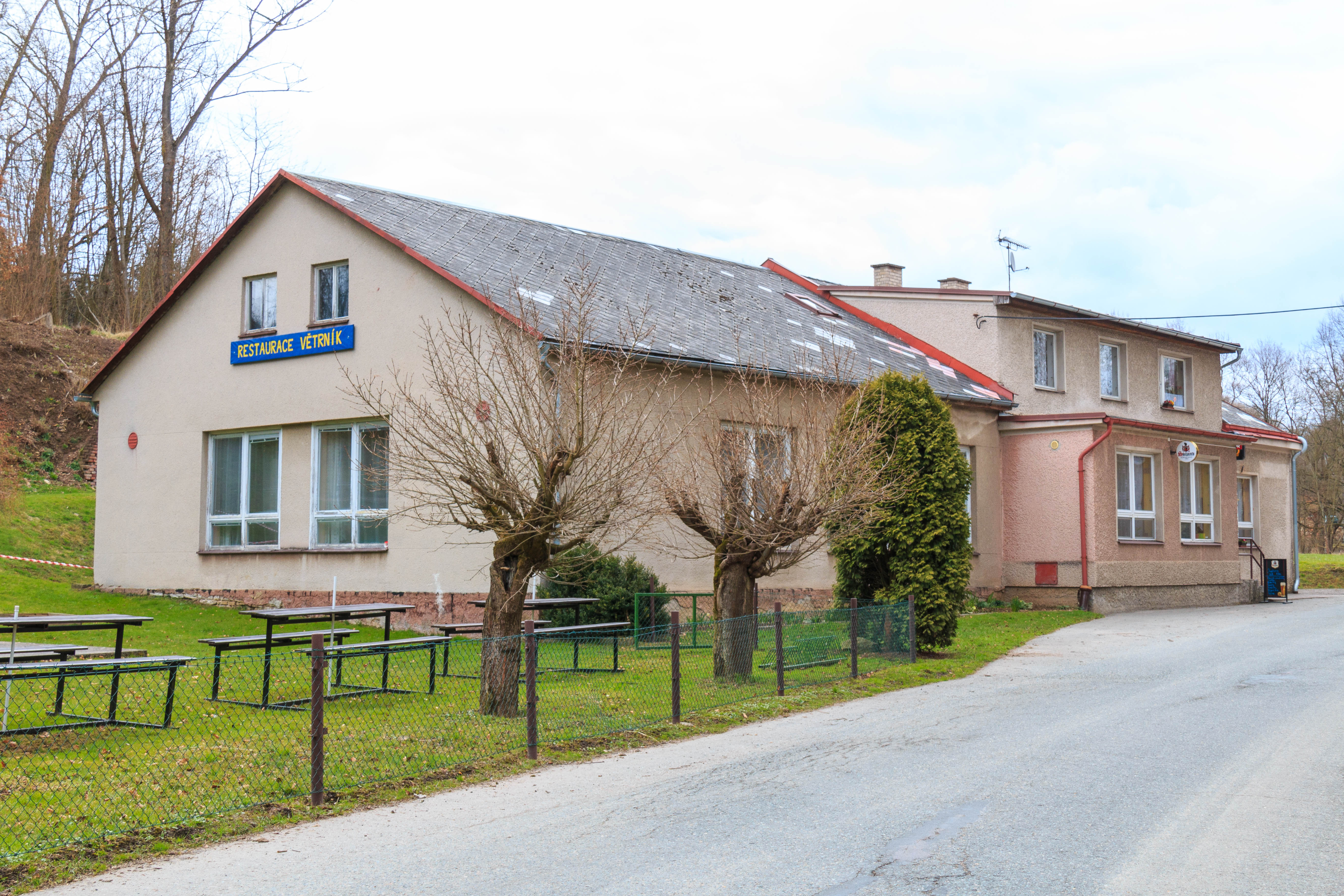 Větrník - hospoda